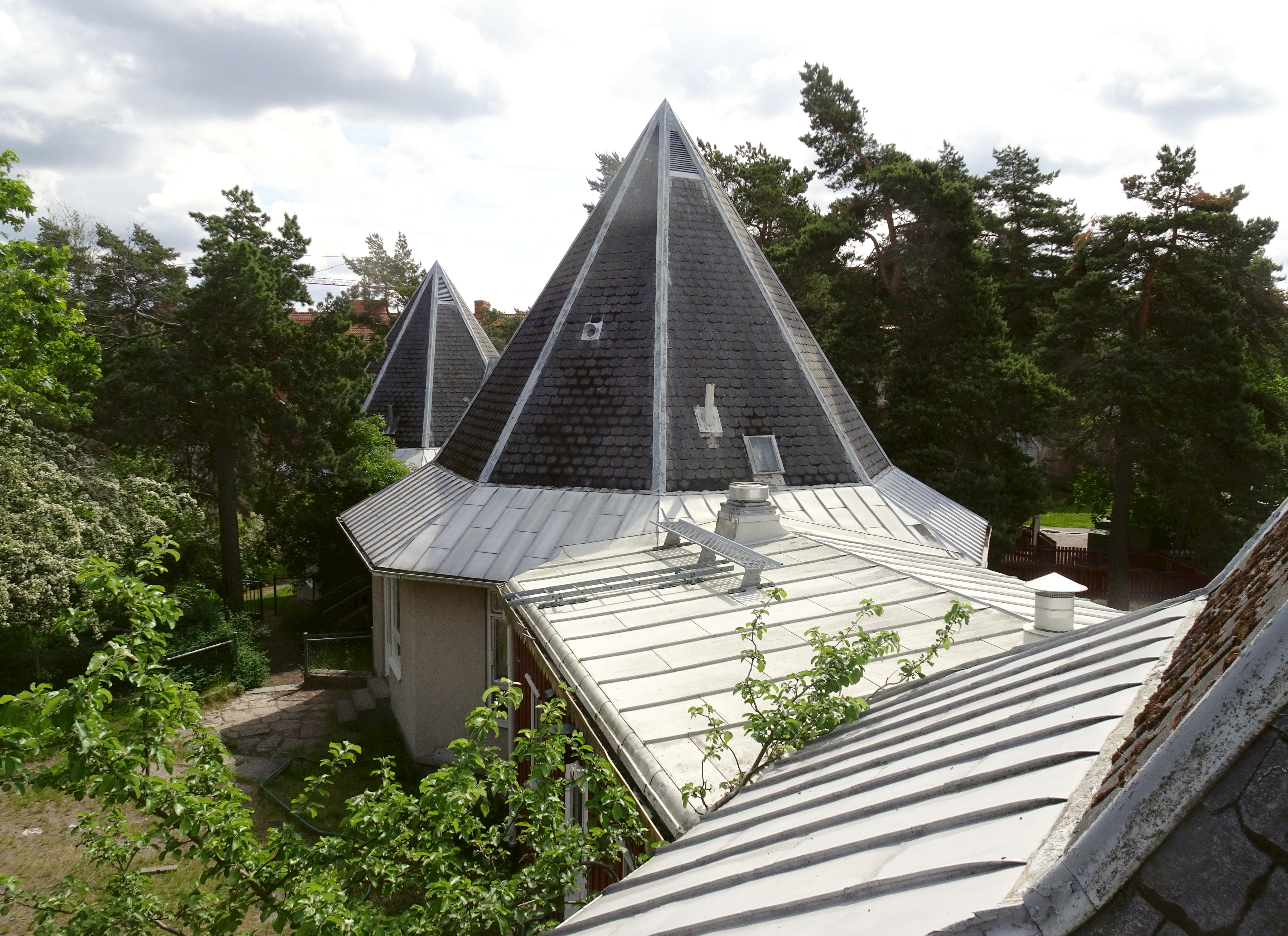 Förskola / daghem "Sköntorpsgården", Årsta, arkitekt Axel Grönwall